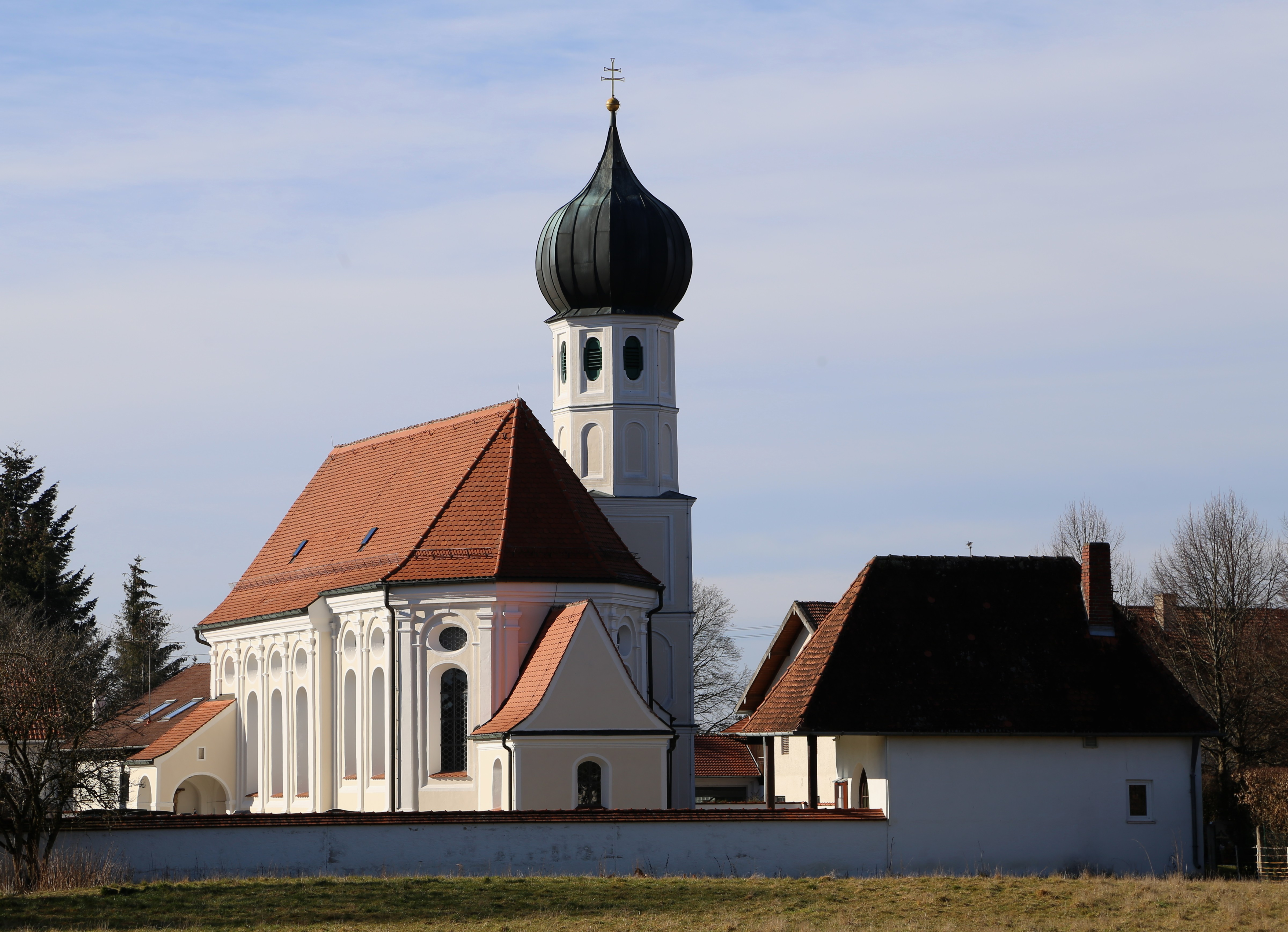 Faistenhaar; Kath. Filialkirche St. Peter und Paul, barocker lisenengegliederter Saalbau mit eingezogenem polygonalem Chor auf Grundlage einer mittelalterlichen Kirche, seitlich angefügtem Zwiebelturm und Sakristei am Chorscheitel, erbaut 1683- 1735, Sakristei 1750, Turm mittelalterlich; mit Ausstattung.